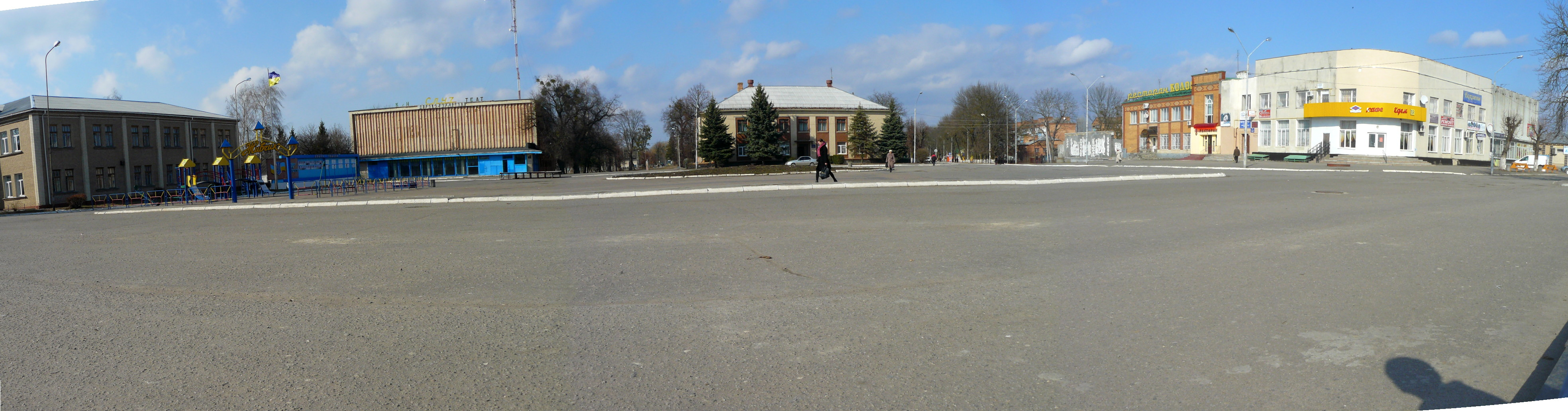 Панорама центральної площі м.Красилова